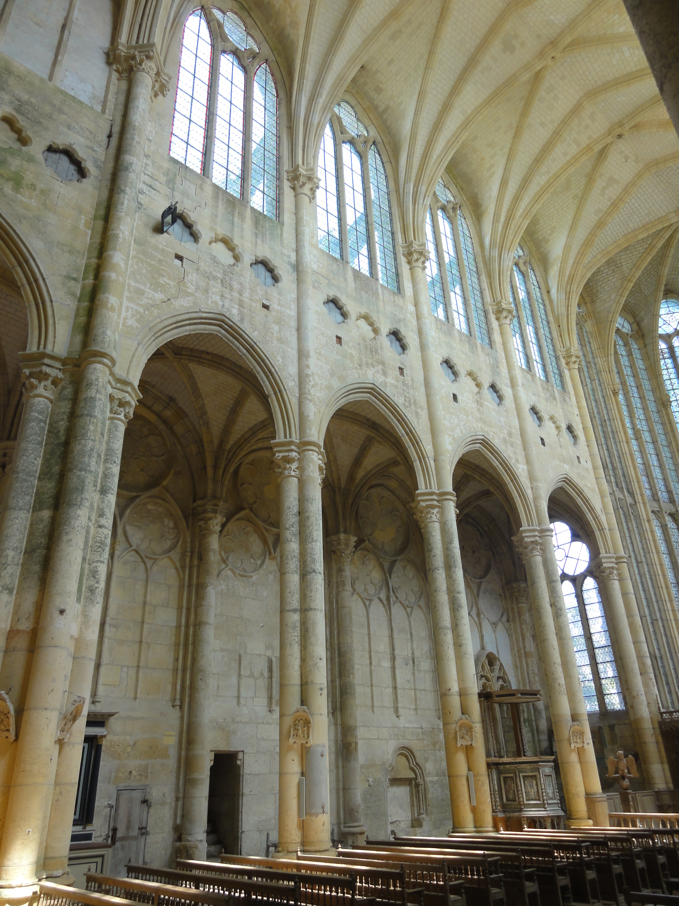 Intérieur, côté nord.